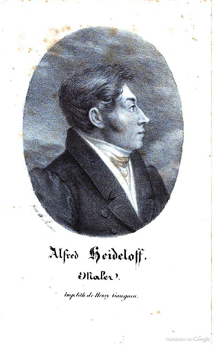 Brustbid des Malers Alfred Heideloff (1802–1826)